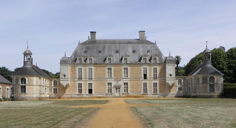 Château du Boschet en Bourg-des-Comptes (35), demeure de la famille Brossay-Saint-Marc.